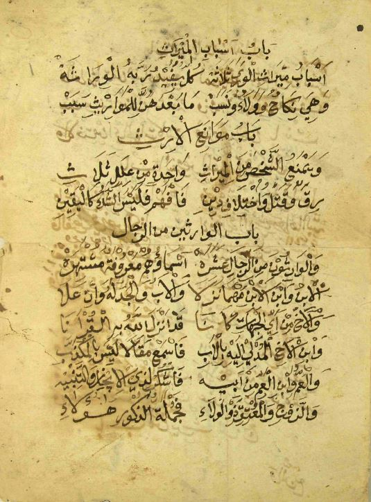 صفحة من نسخة مخطوطة لمتن الرحبية